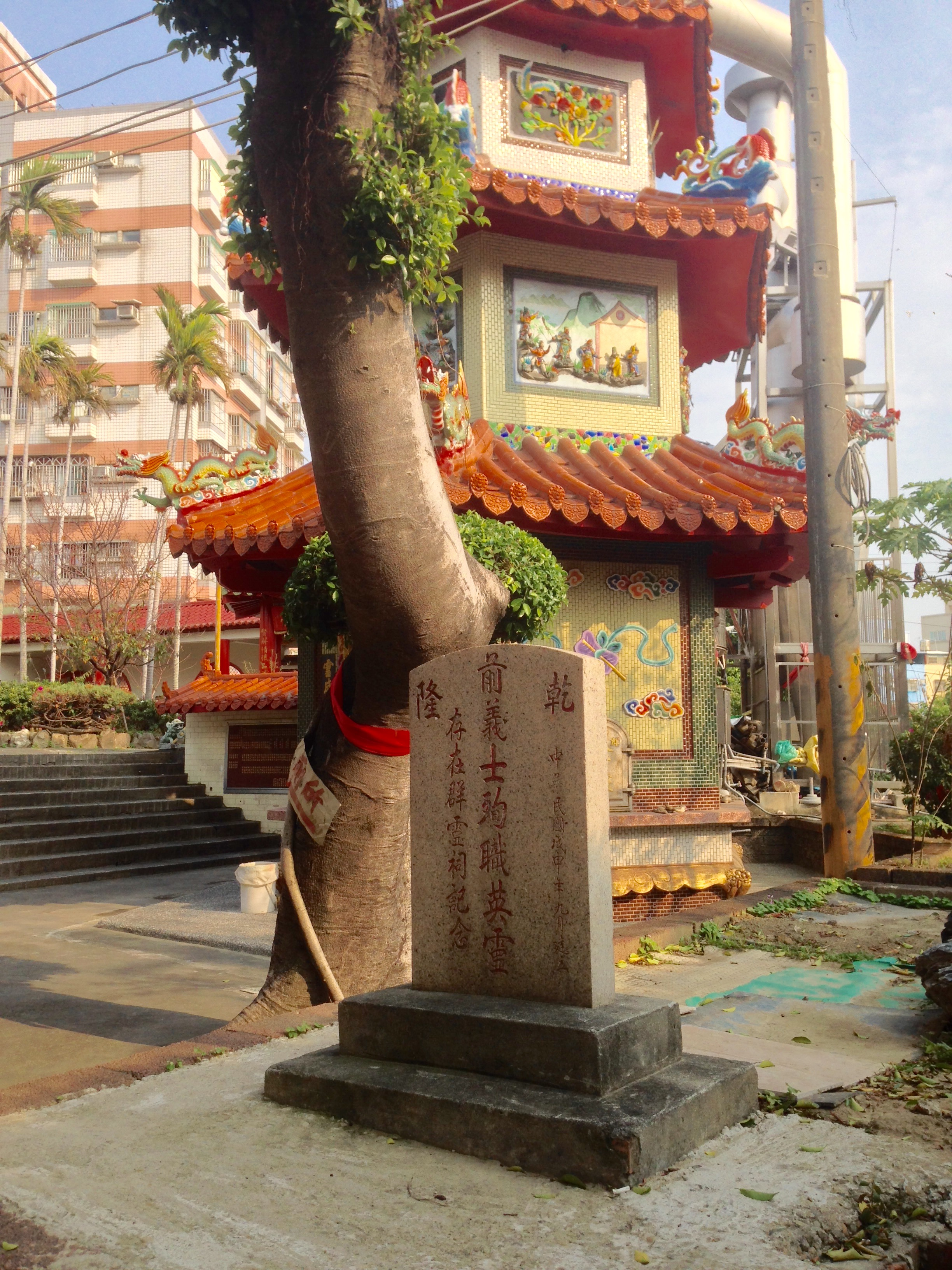 群靈祠墓碑